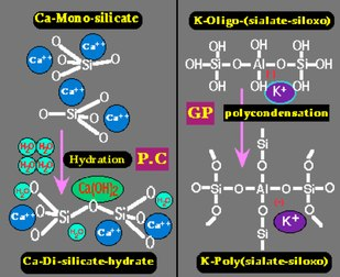 comparaison entre chimie Portland et chimie géopolymère